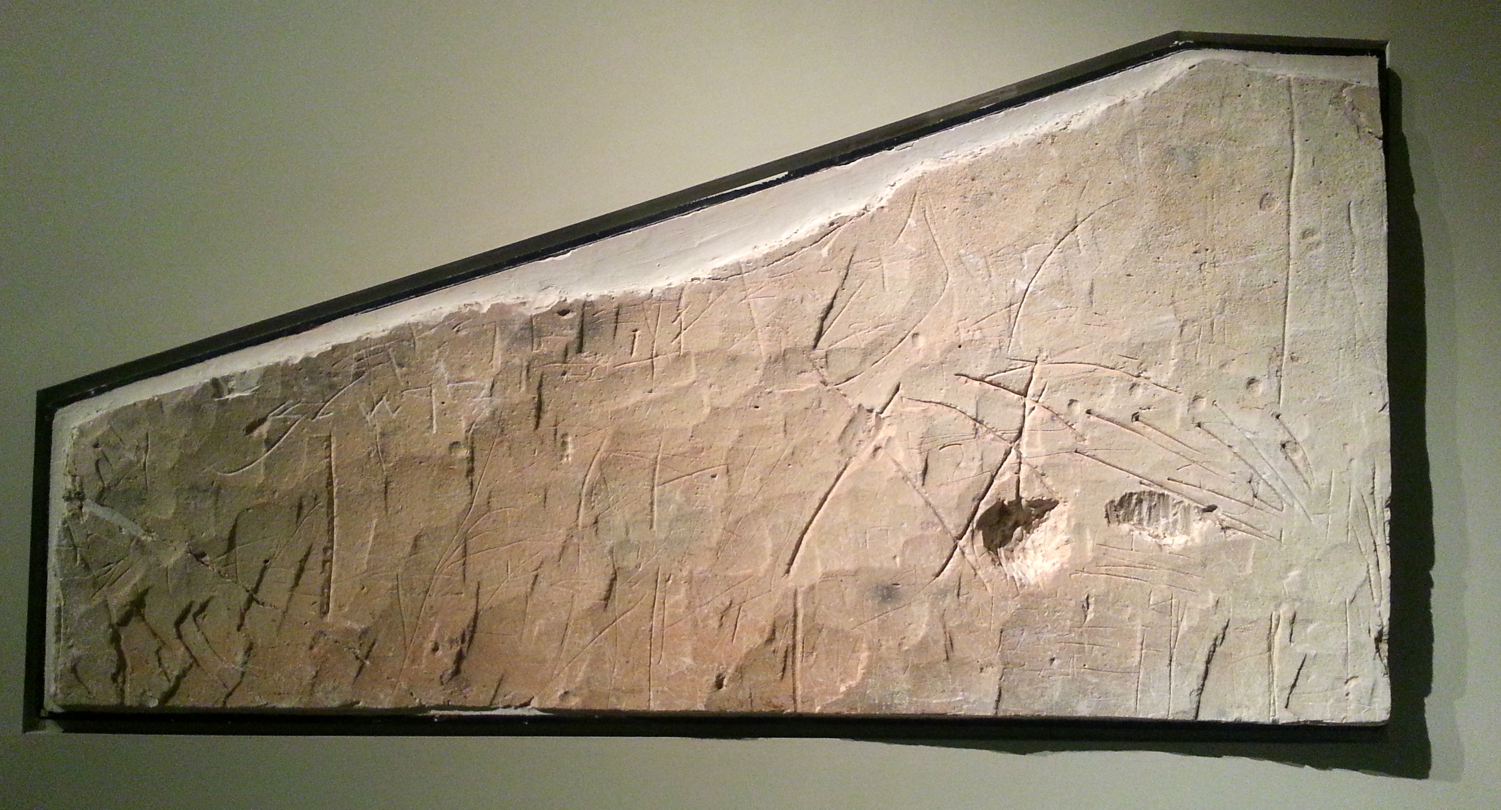 העתק פריט מוצג במוזיאון ישראל בירושלים; כתובת עברית על קיר אבן גיר של מערת קבורה - ובה איזכור "ירושלם" [כך - בלי יו"ד]; חורבת בית לויה, שפלת יהודה שלהי המאה ה-6 לפנה"ס; Transcribed and translated by Naveh as follows: yhwh ‘lhy kl h’rsh ry yhd l’lhy yršlm Yahveh (is) the God of the whole earth; the mount- tains of Judah belong to him, to the God of Jerusalem